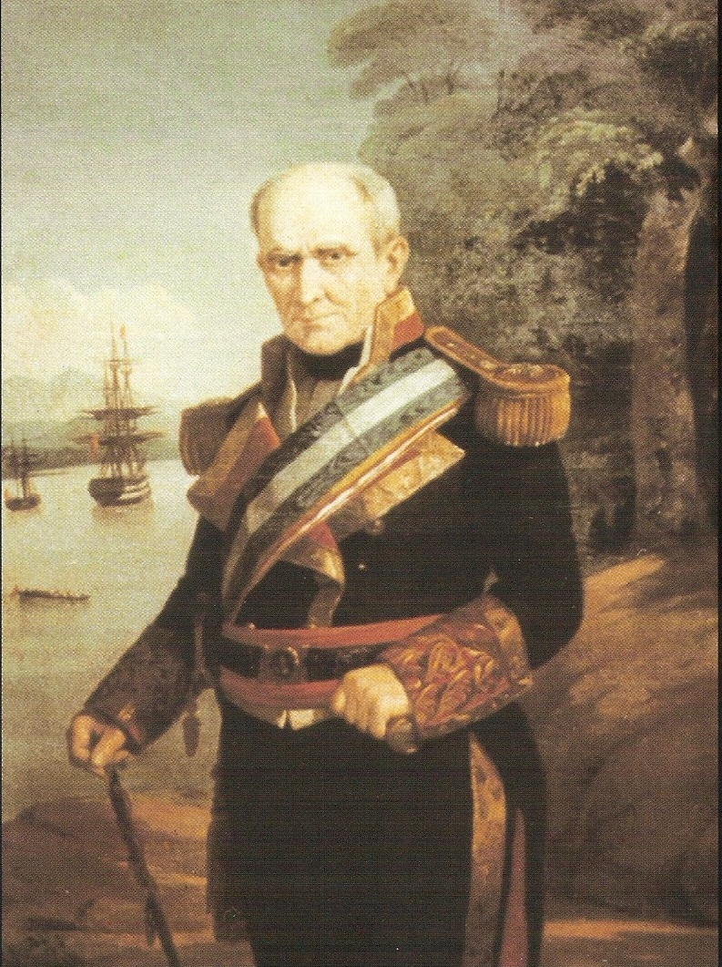 Fotografia realizada en el museo de la Torre del Oro y recortada